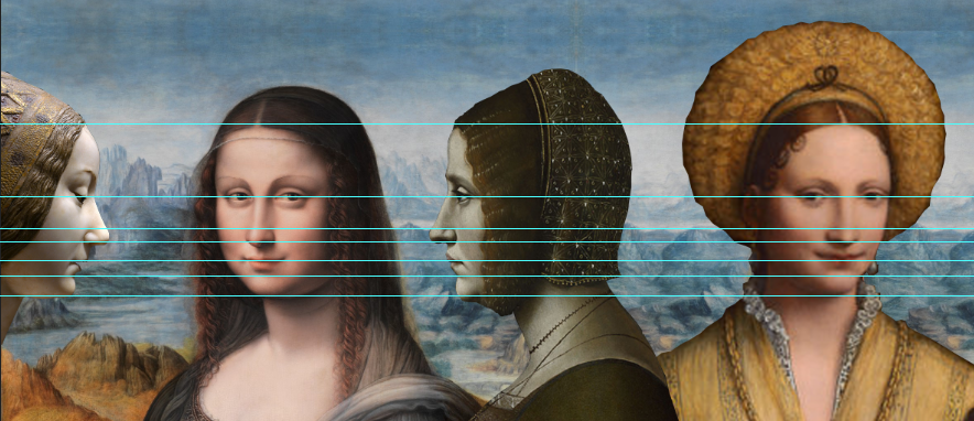 Comparativa de las facciones con el rostro de la Mona Lisa